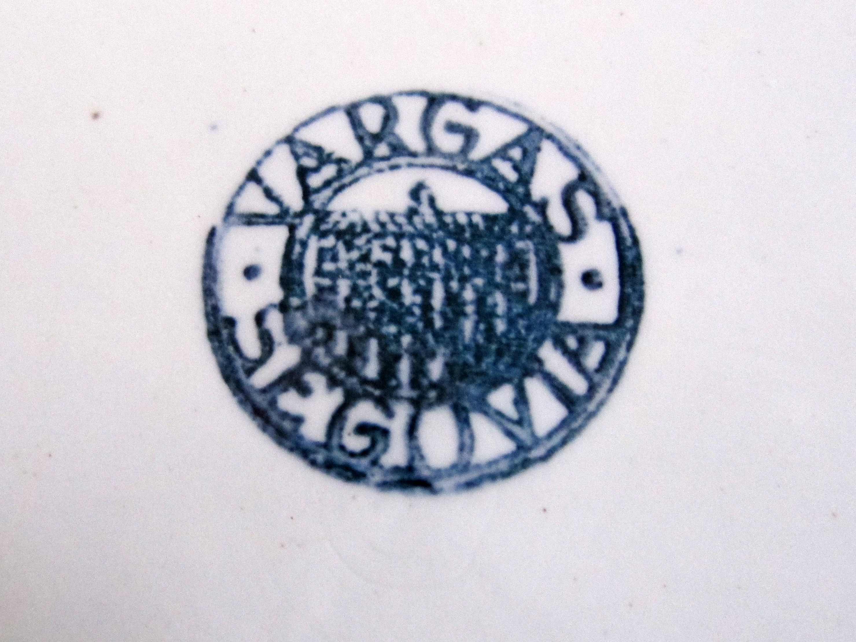 Marca de la loza de la antigua fábrica La Segoviana también llamada Vargas ubicada en Segovia (España) Fundada en 1861